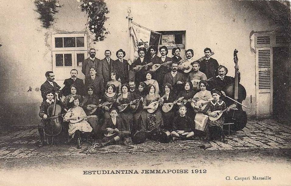 L'Estudiantina Jemmapoise inspirée par les Estudiantinas universitaires.